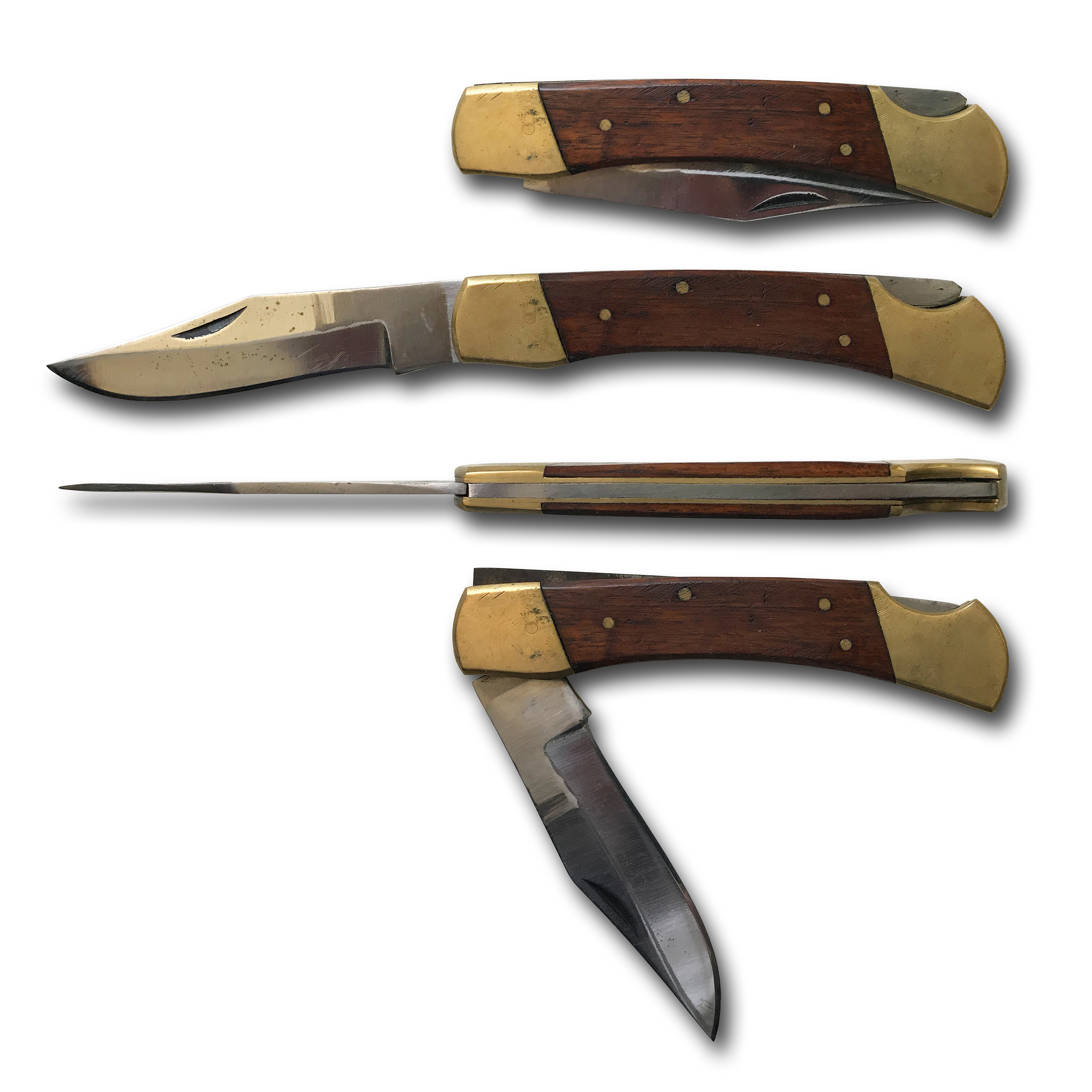 Taschenmesser mit Wippen-Verriegelung (mit Mulde zum Entriegeln am Hinterende des Griffs)